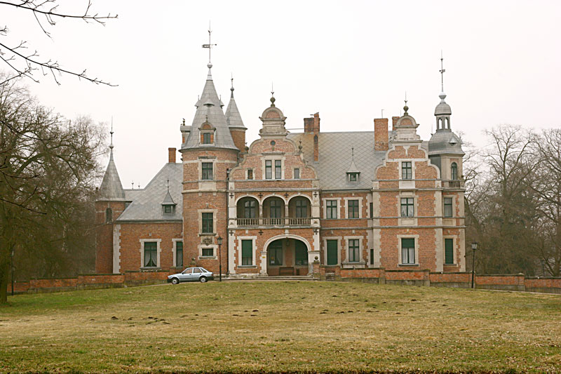 Pałac w Kobylnikach